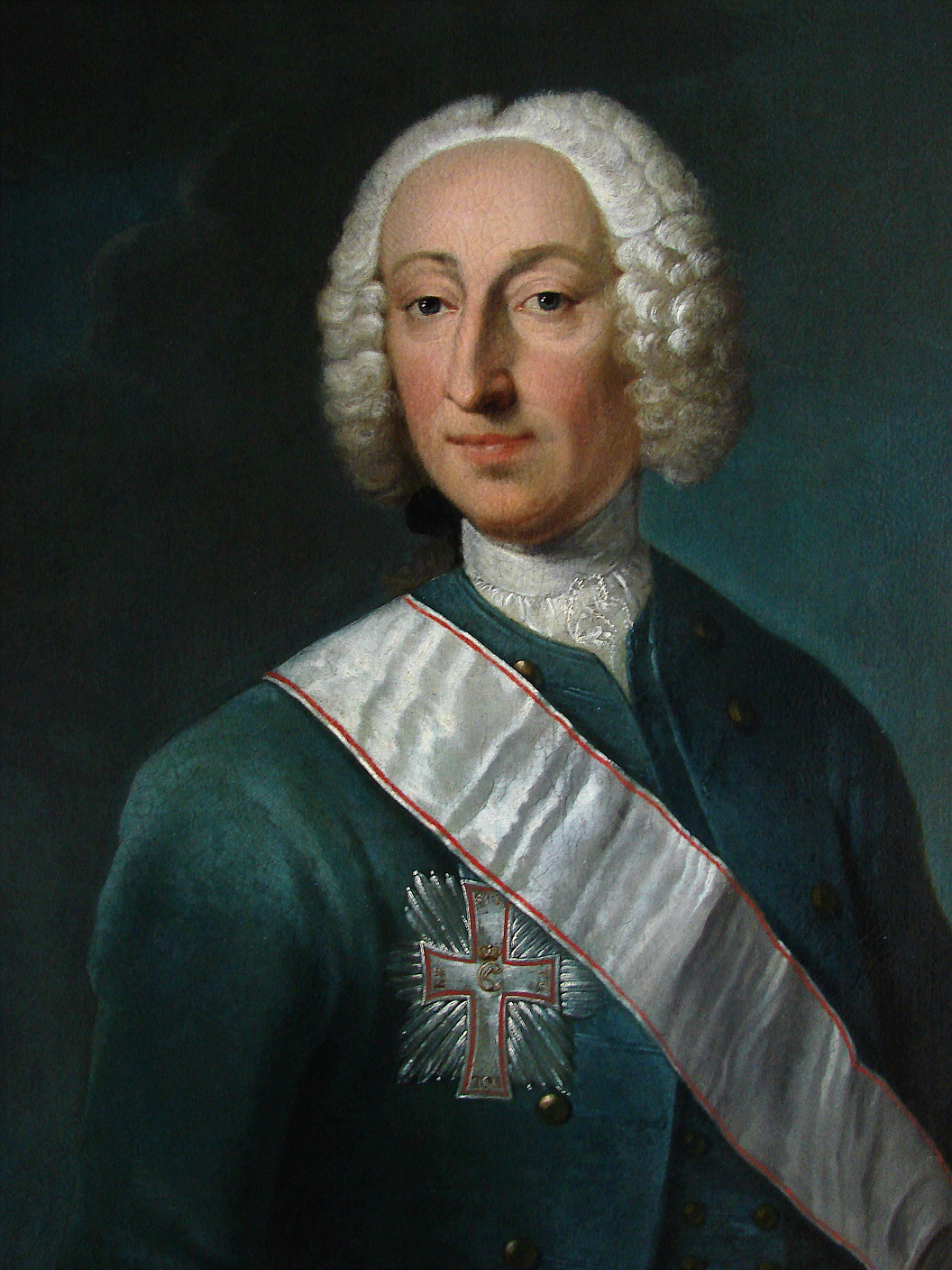 Otto Thott (1703–1785), statsminister, angives malet af Andreas Brünniche, Frederiksborg Slot, Sjælland